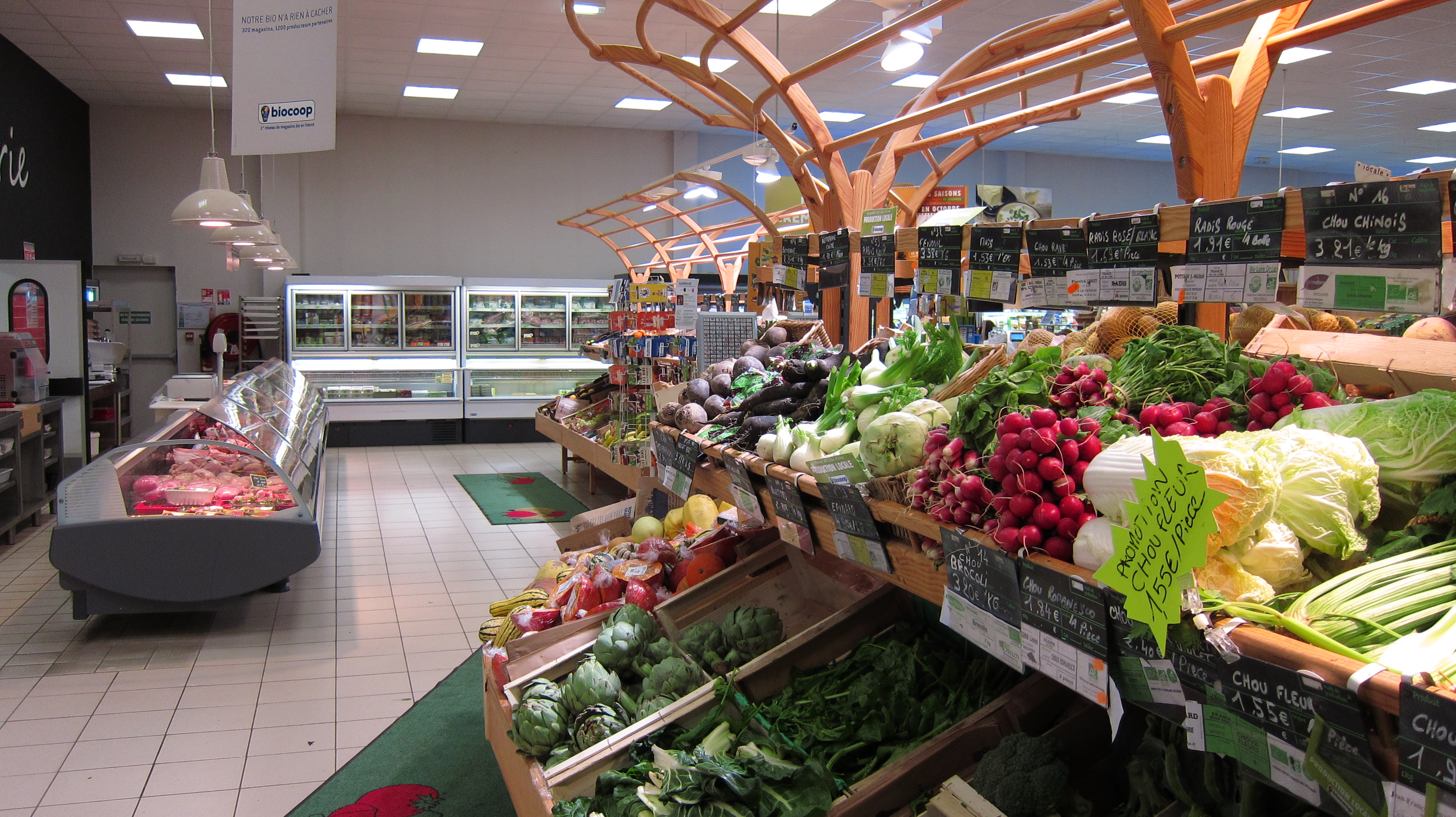 Rennes (Ille-et-Vilaine, Bretagne, France) : Intérieur de la Biocoop Scarabée Cleunay.